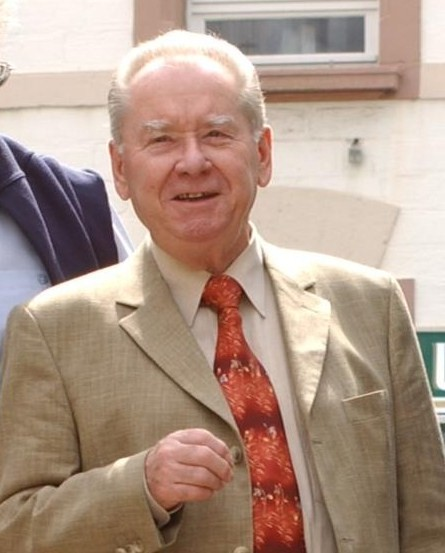 Saarländischer Landtagspräsident a.D. Albrecht Herold